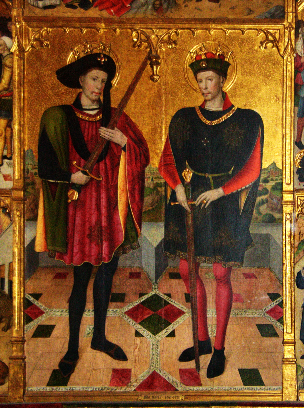 Representa els sants Abdó i Senén i la pradel.la és dedicada als sants metges Cosme i Damià. És una de les poques obres que es poden atribuir amb tota certesa a Jaume Huguet, ja que se'n conserva el contracte de l'any 1460. Huguet és l´únic representant català de la tendència flamenca, que domina el període final del gòtic. A la taula central hi són representants els sants titulars, Abdó i Senén, prínceps de Pèrsia que van ser capturats i morts a Roma. Per causes desconegudes, sembla que les relíquies d'aquests sants van ser traslladades a Arlés del Tec (Vallespir) i d'aquí la rao que gaudissin d'un culte ben arrelat a Catalunya, invocats com a patrons de la pagesia i coneguts com Sant Nin i Sant Non. Composen el reatule un Calvari i quatre escenes relatives als sants. A la pradel.la es descriuen escenes del matitiri i la mort dels sants Cosme i Damià, metges amb un possible origen àrab i, com els anteriors, també molt venerats a Catalunya. Al guardapols, decoracions de tipus vegetals i les armes de Terrassa i Barcelona. Actualment es troba a l'Església de Sant Pere de Terrassa.